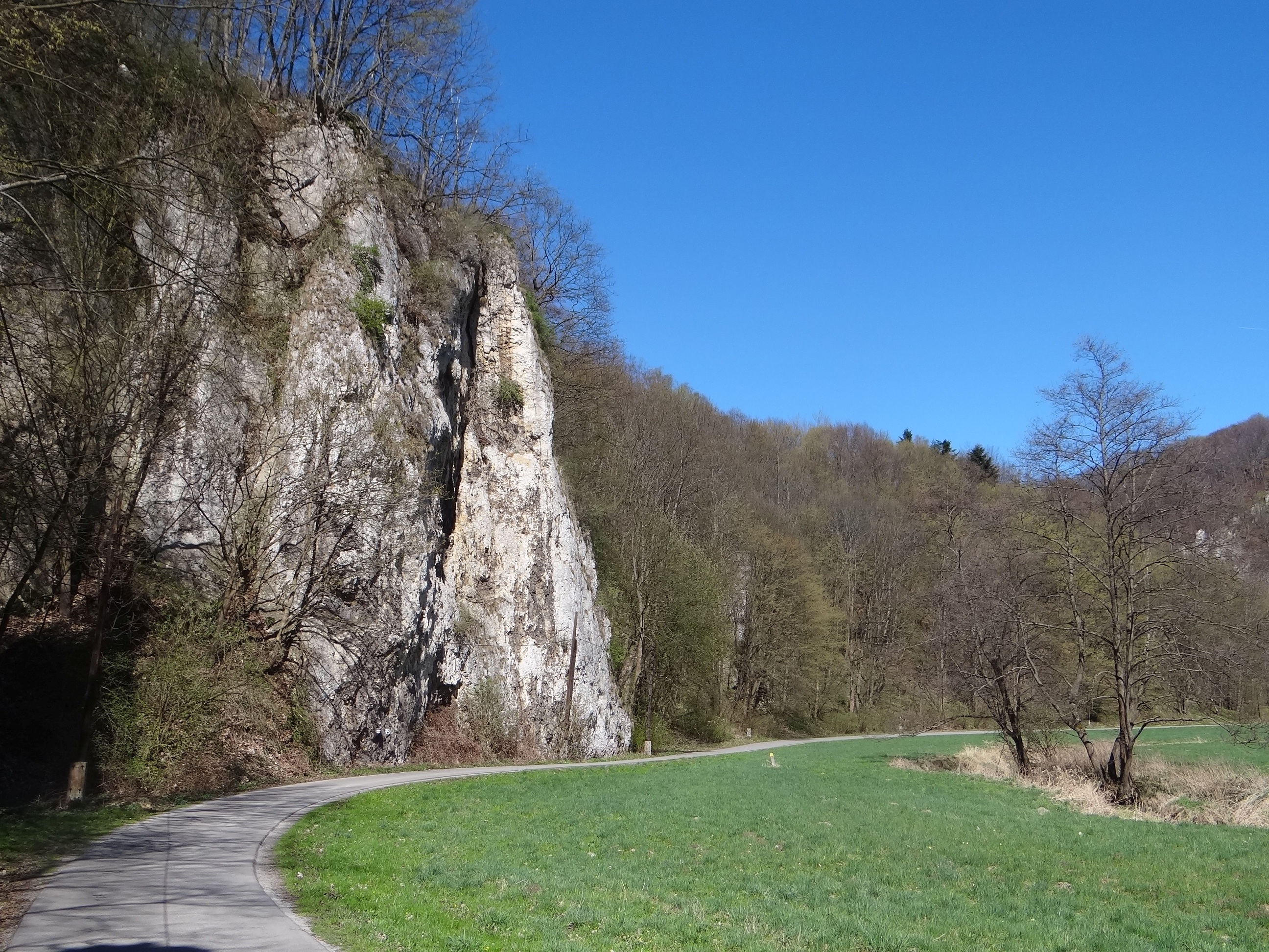 Skała Koźniowa w Ojcowskim Parku Narodowym